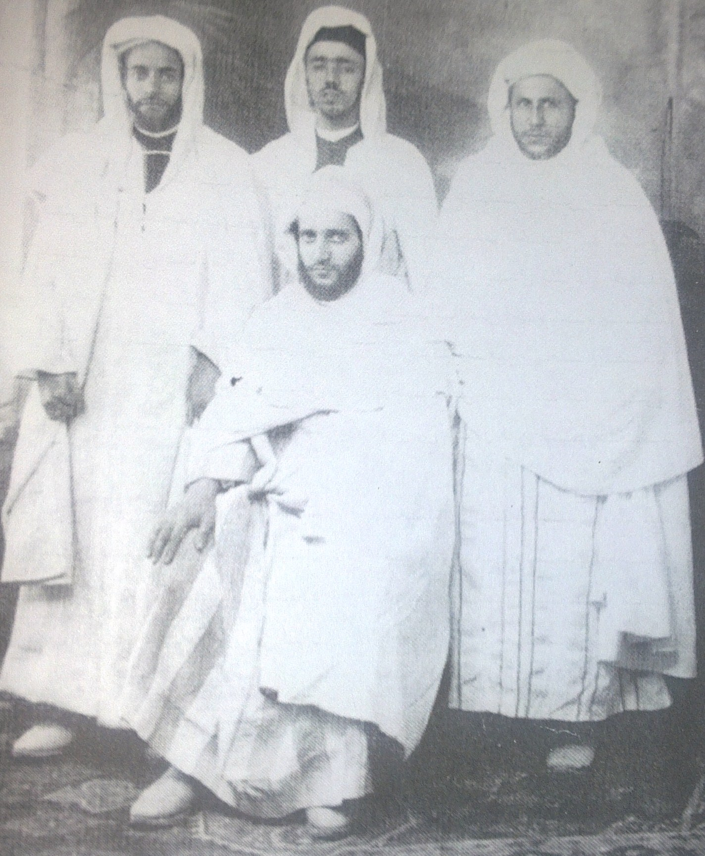 au milieu : Mohamed Ghazi de gauche à droite : Abdelazziz Bendriss, Boubker El Kadiri et Hadj Ahmed Cherkaoui